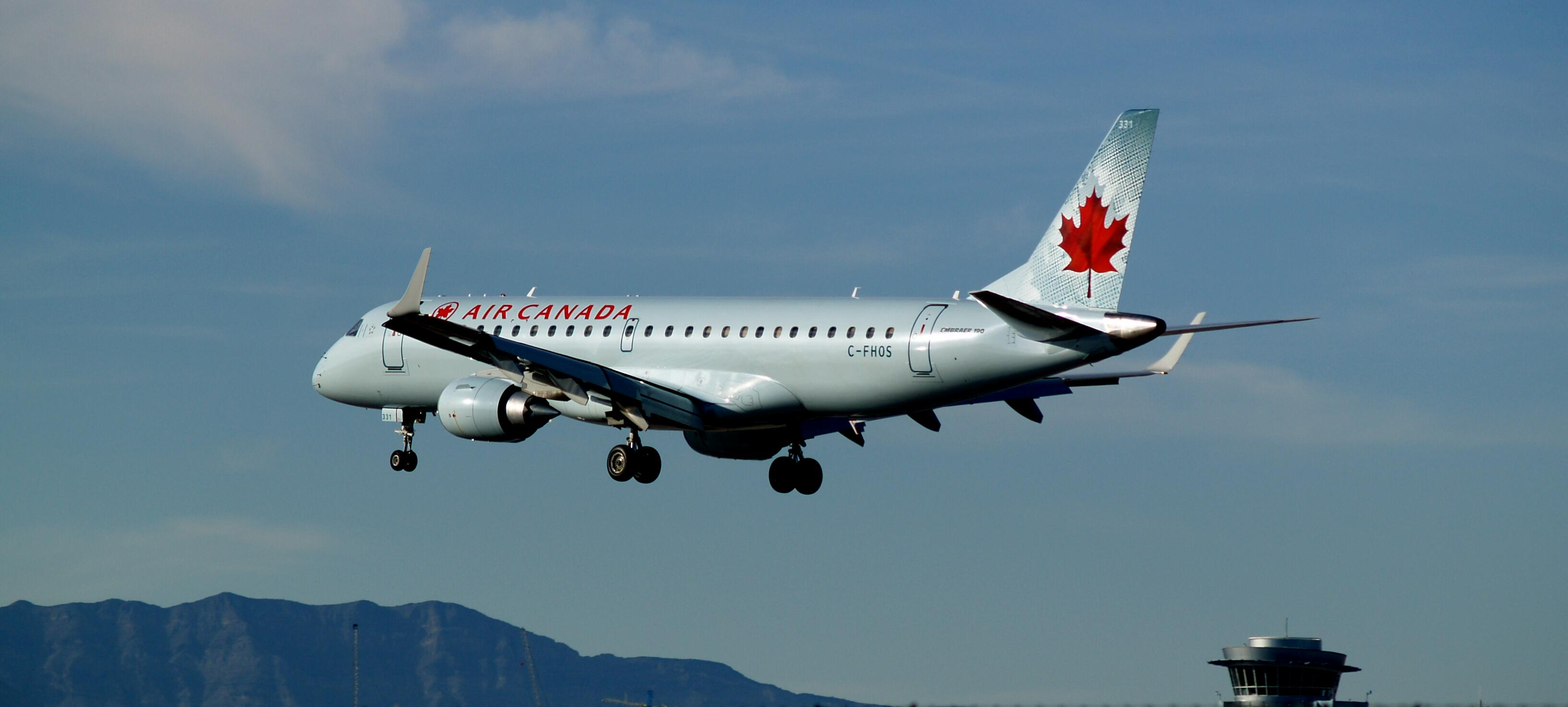 Air Canada Embraer ERJ-190-100